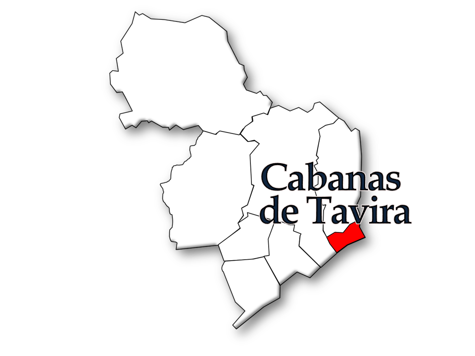 Censos 1864/2011